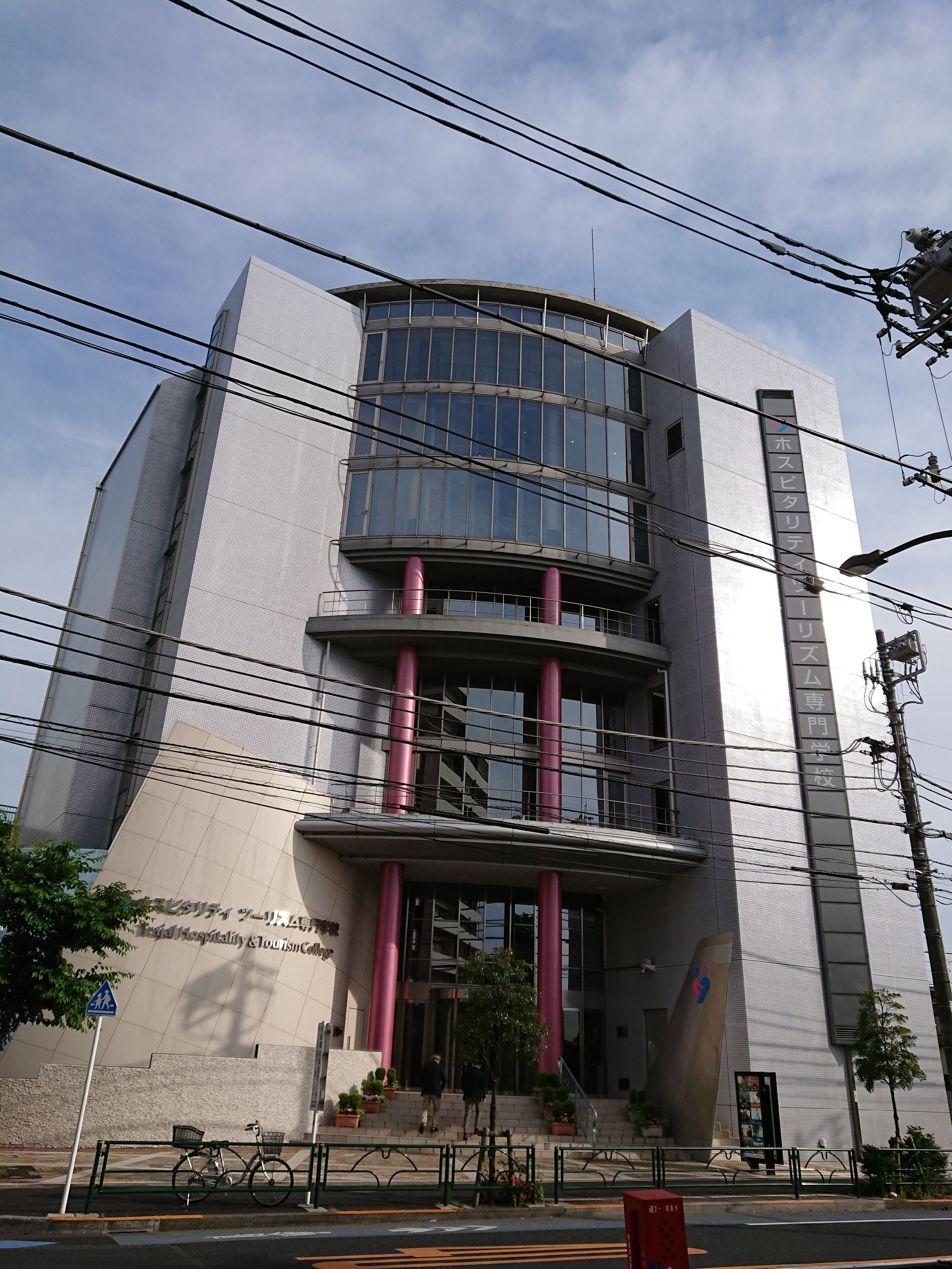 トラジャル東京校の外観